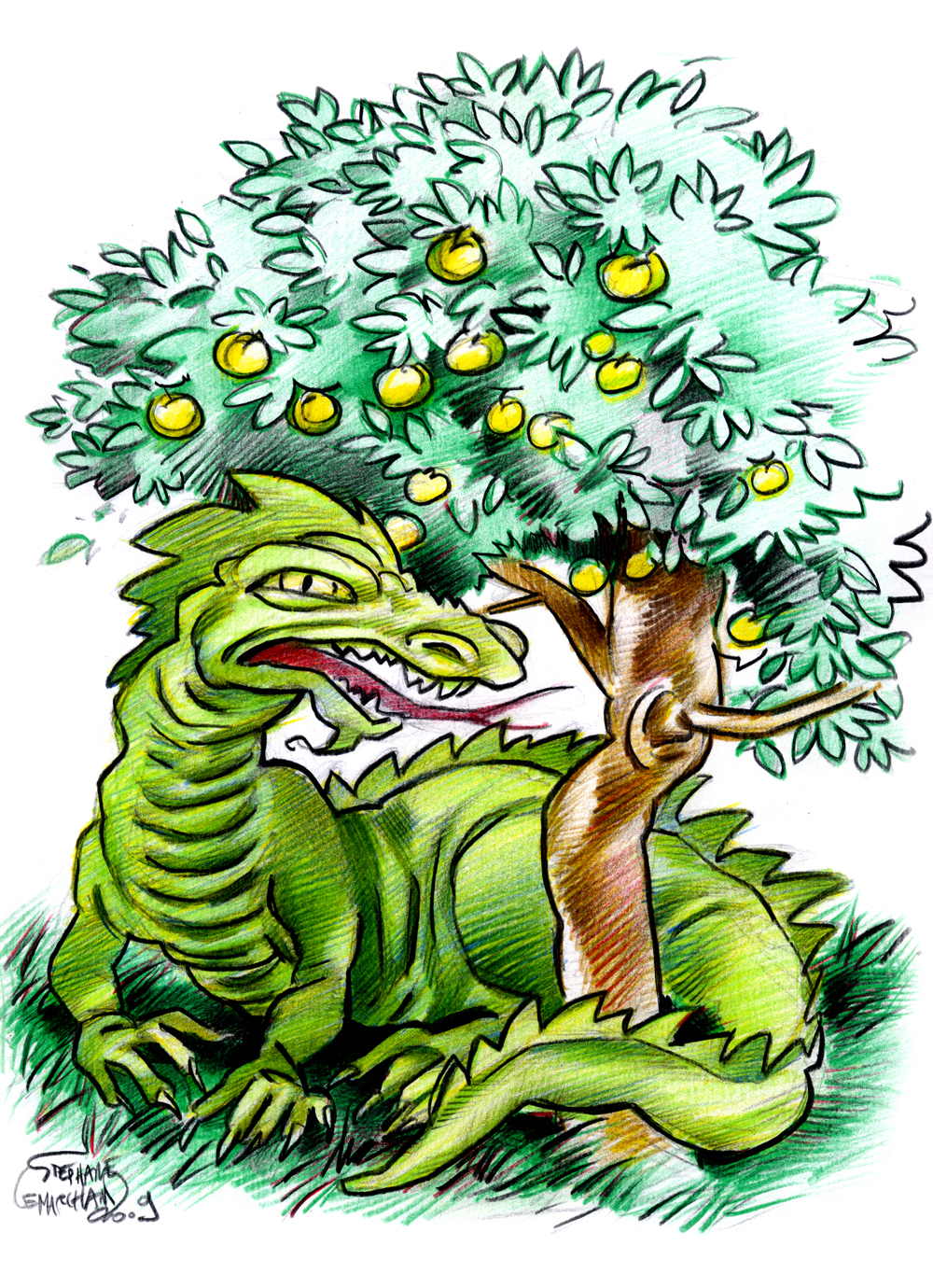 Drako sub orpomujo